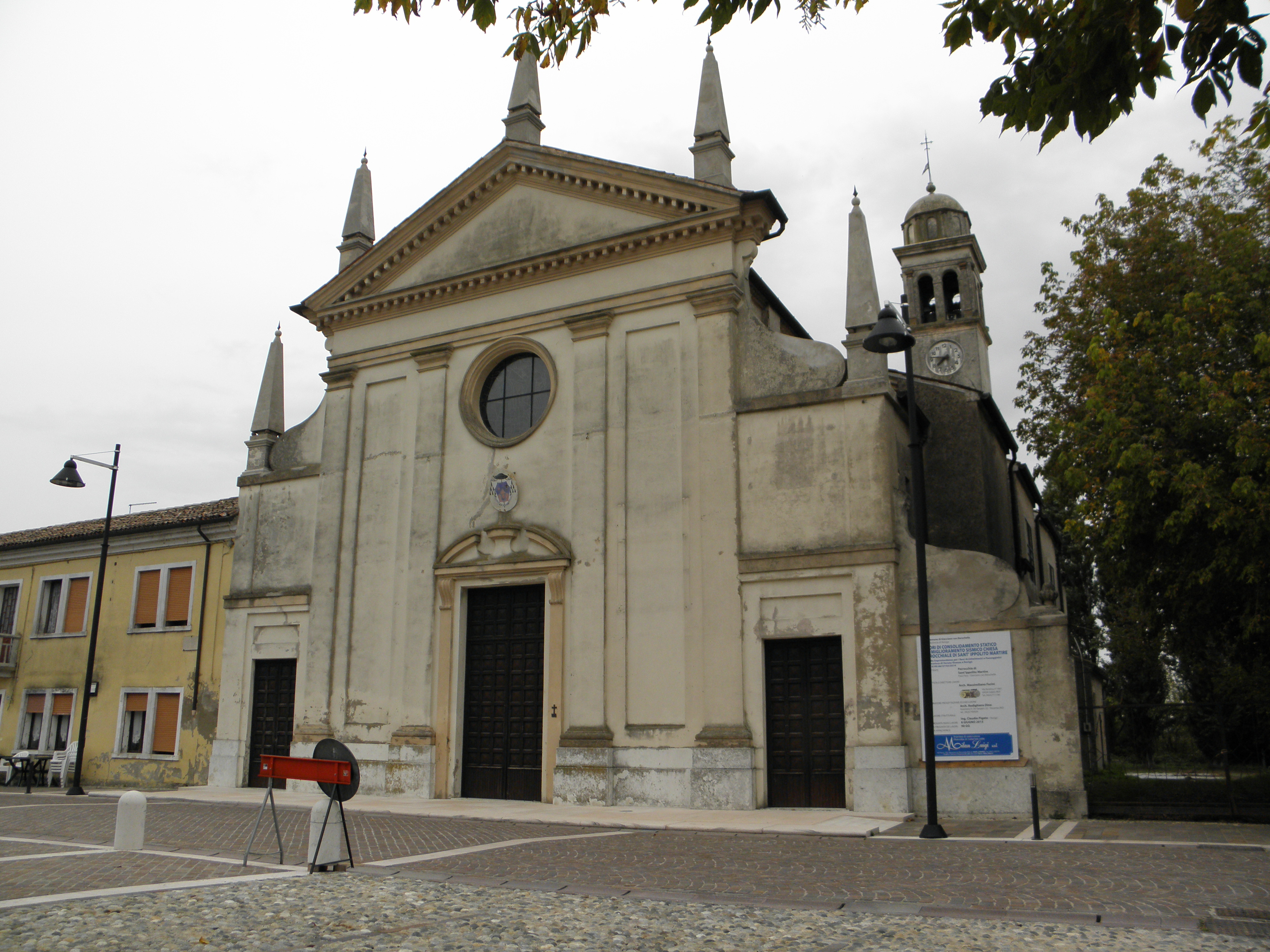 Giacciano, frazione del comune sparso di Giacciano con Baruchella: la chiesa parrocchiale di Sant'Ippolito.